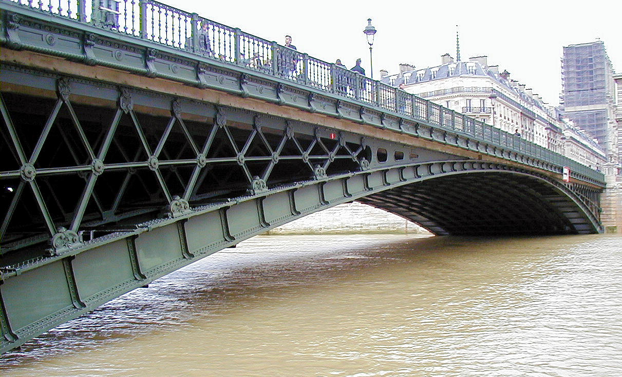 Pont d'Arcole - Vue d'ensemble vers Notre-Dame